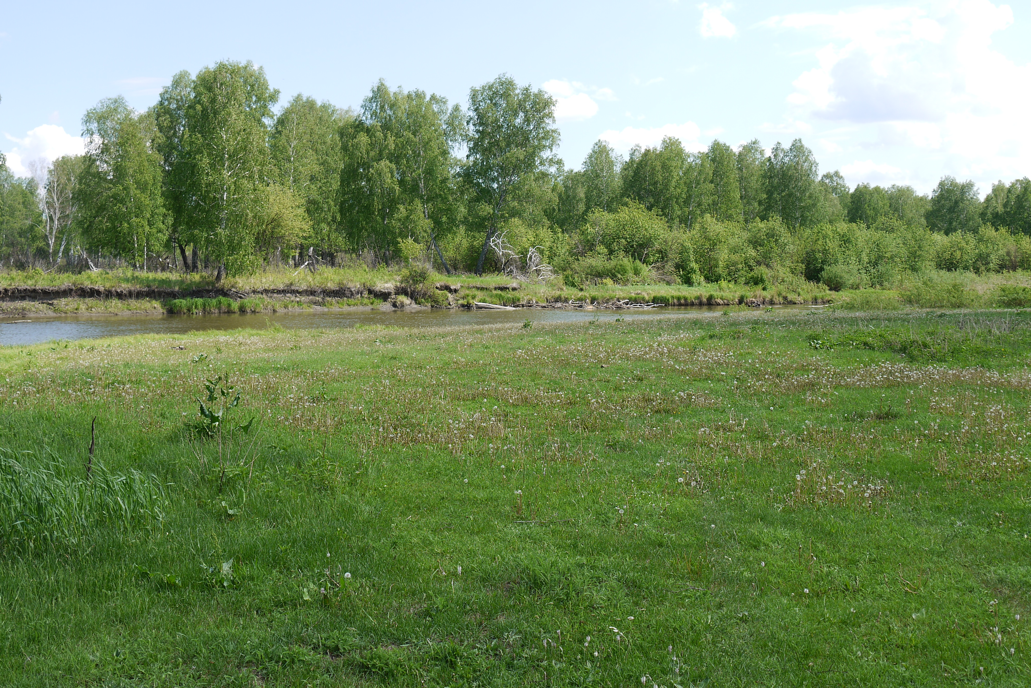 Излучина реки возле Кайгородово, начало лета 2011г.